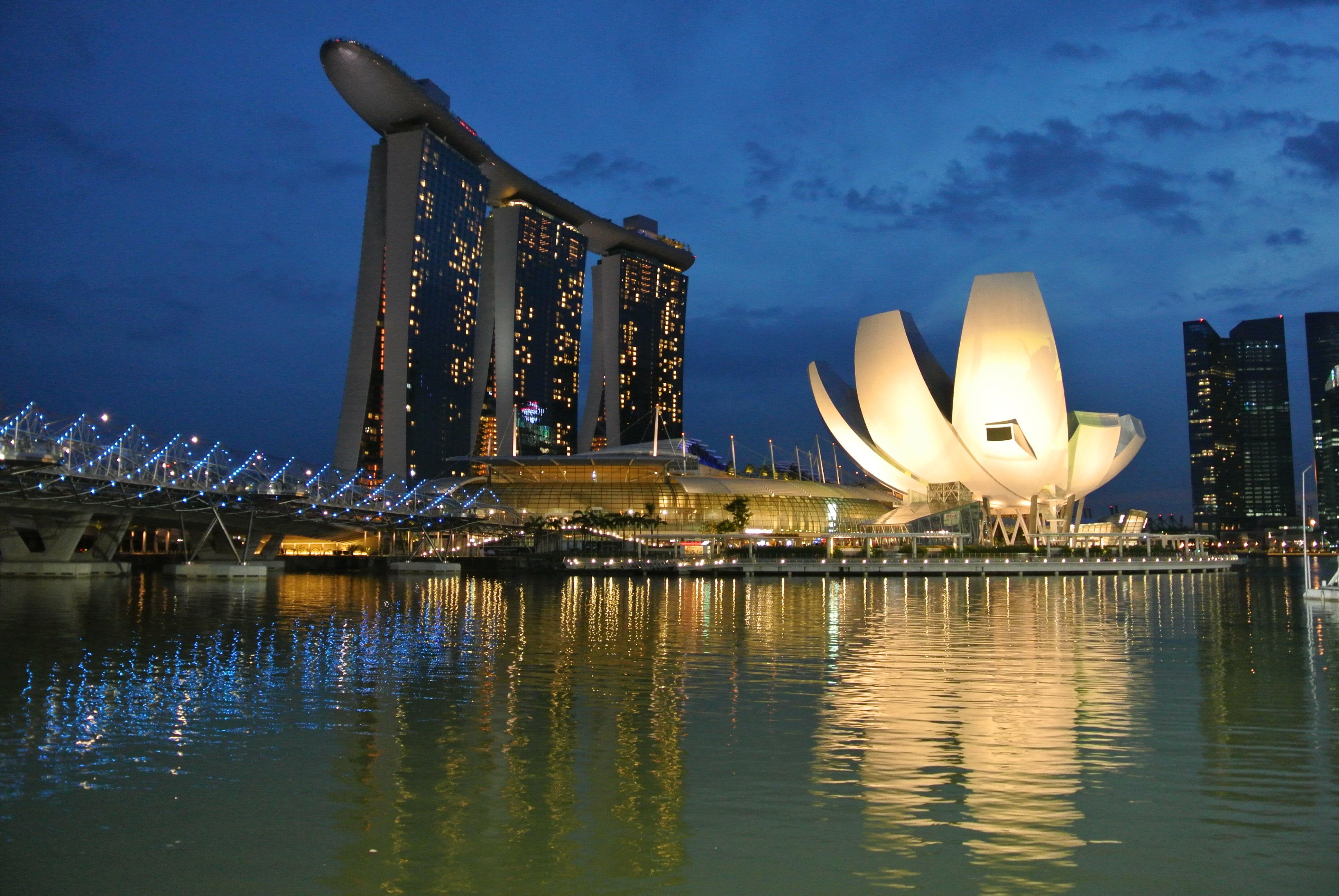 Marina Bay Sands at twilight